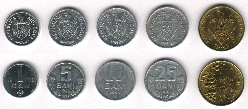 leu moldovenesc